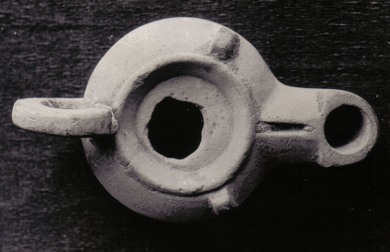 1956 roemische Oellampe gefunden in Alsenborn - history of Alsenborn in Landkreis Kaiserslautern, Germany